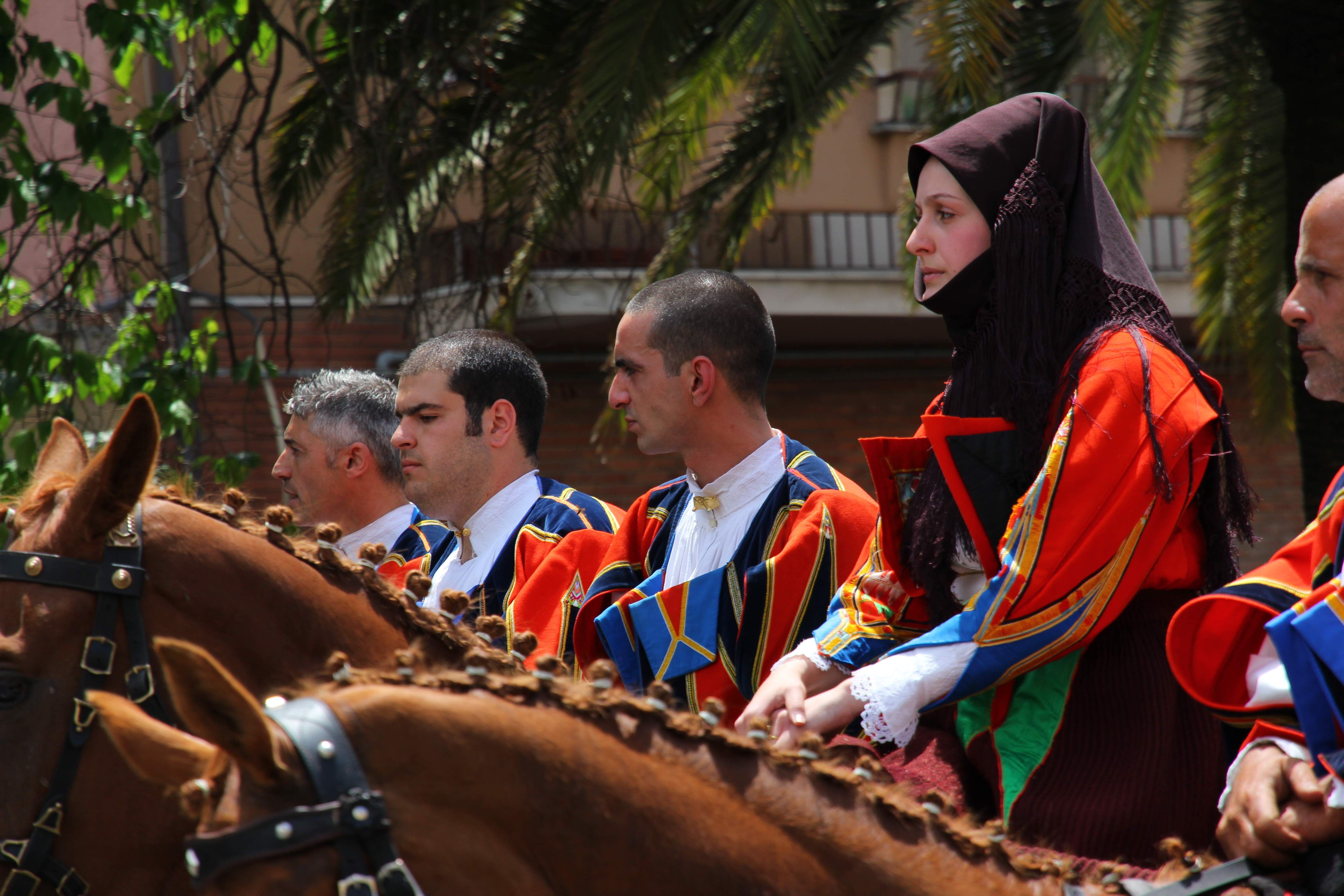 Costume tradizionale